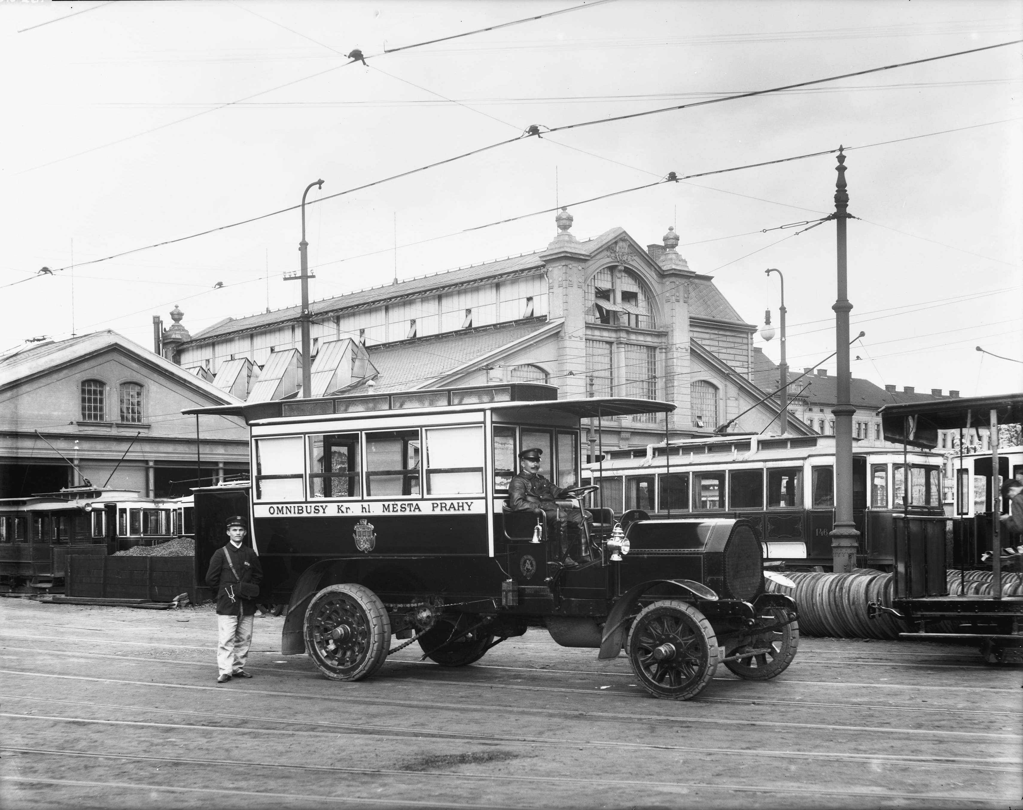 Pohled autobus s řidičem a průvodčím první pražské autobusové linky (provozované ještě jako "Omnibusy Kr. hl. Města Prahy") před Vozovnou Centrála v Holešovicích